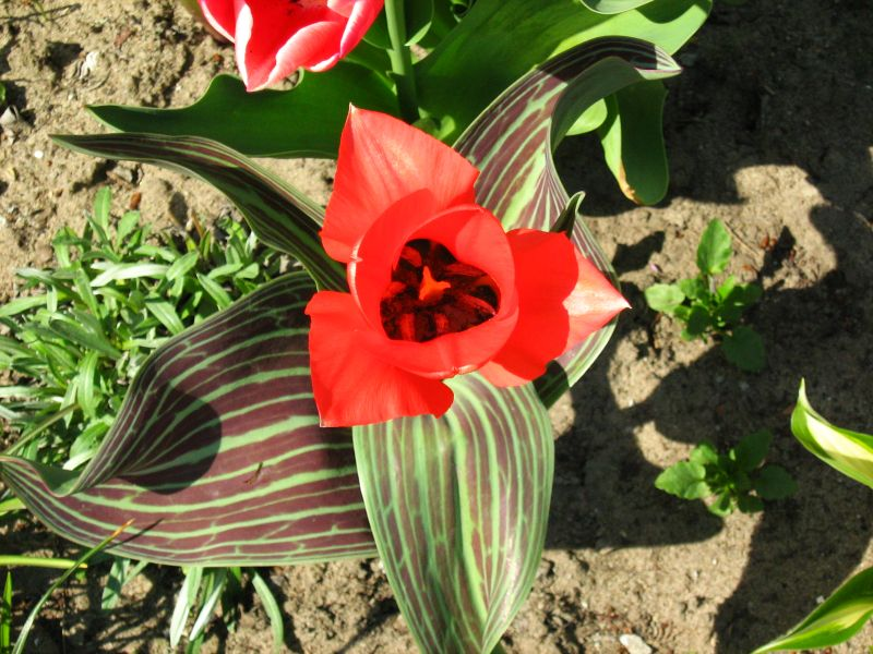 Tulipan Greiga (Tulipa greigii Regel) z mojego ogrodu